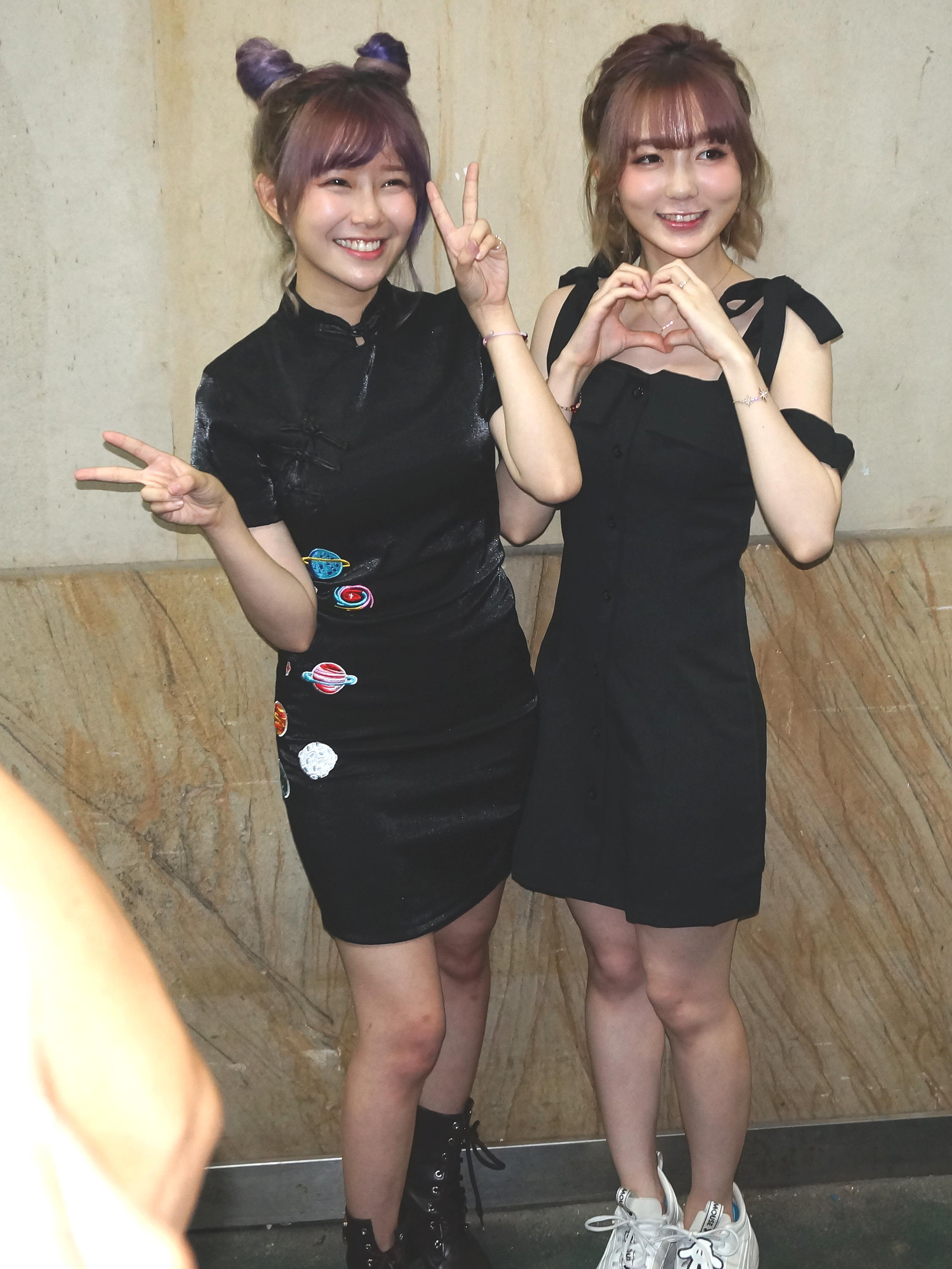 第二屆wecanLive遊戲動漫嘉年華最終日，舞台直播節目《攤位趴趴造》主持人阿樂（左）、妮妮子（右）。